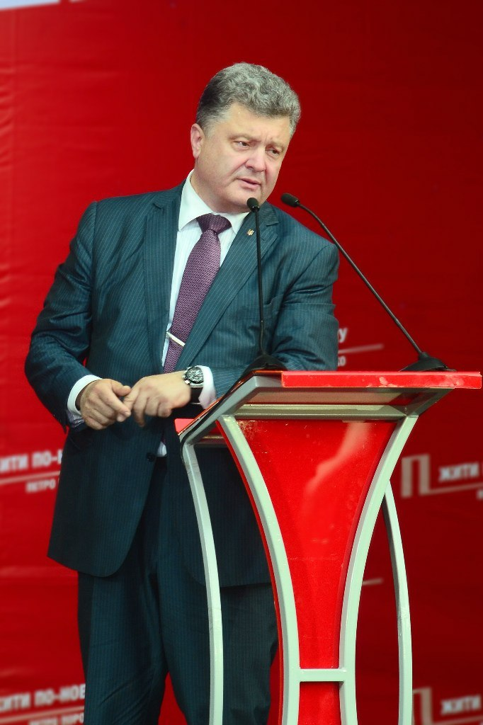 Встреча с кандидатом в президенты Украины Петром Порошенко во Львове, 22 мая.